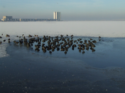 Wak in de Binnenschelde te Bergen op Zoom